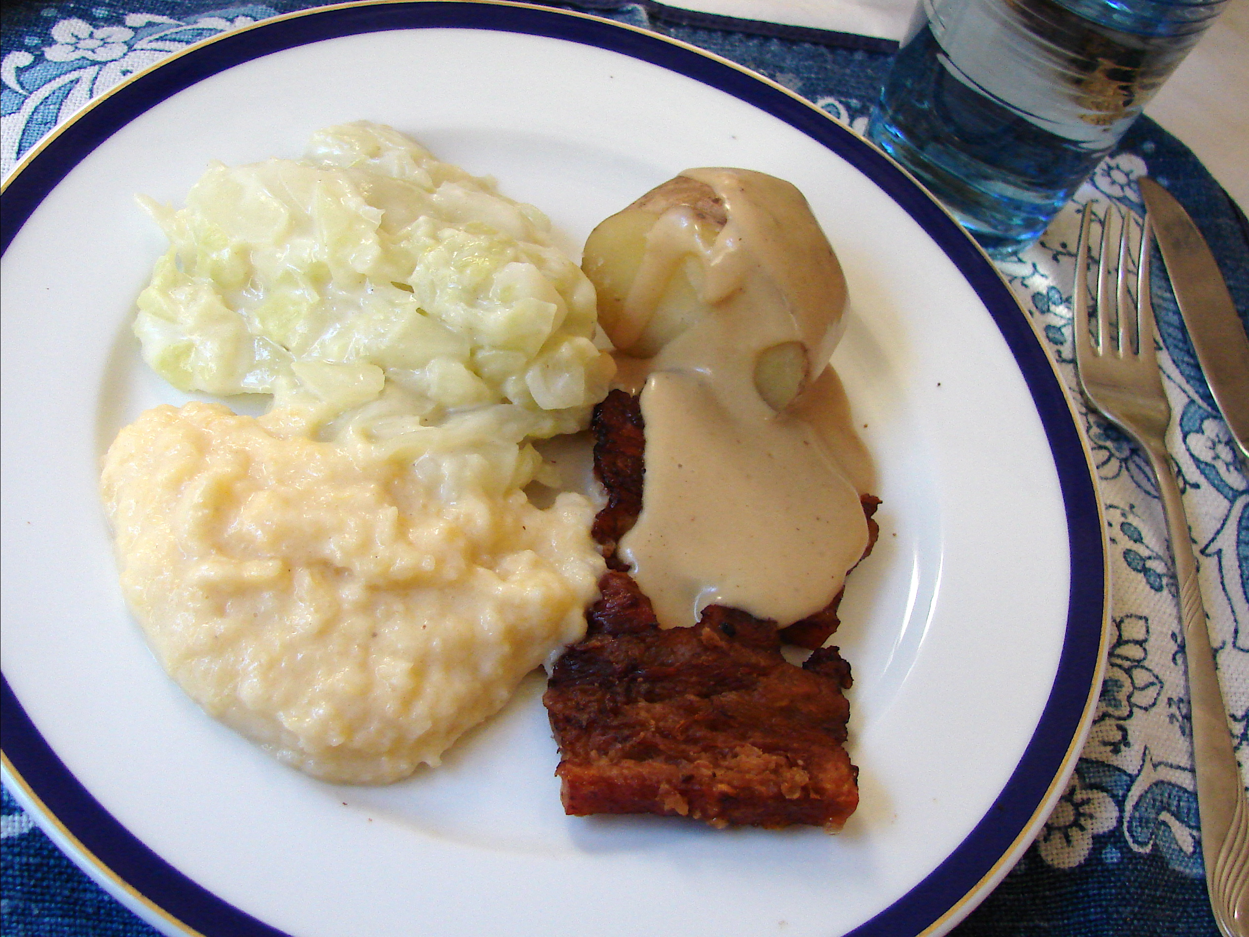 Flesk og duppe